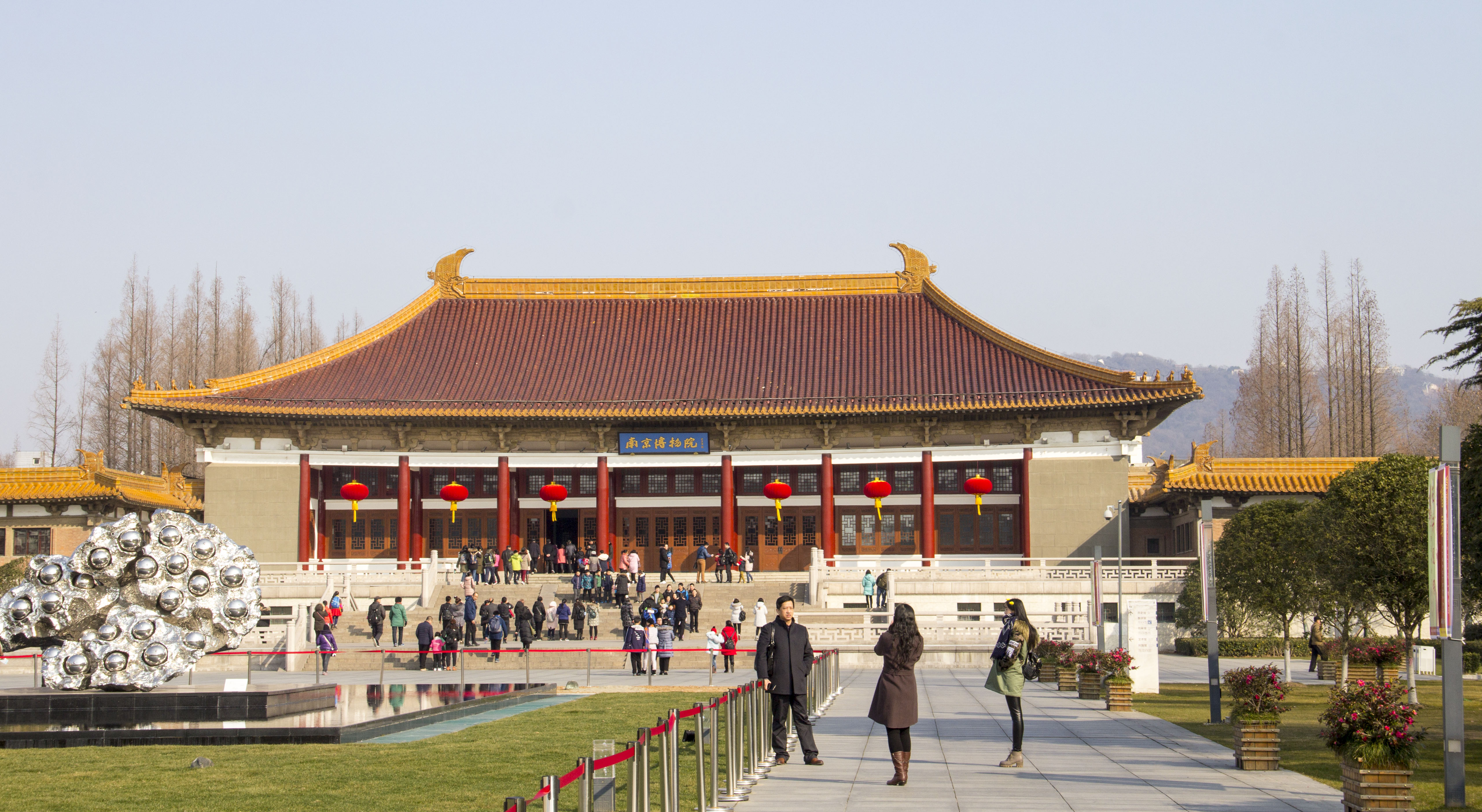 南京博物馆